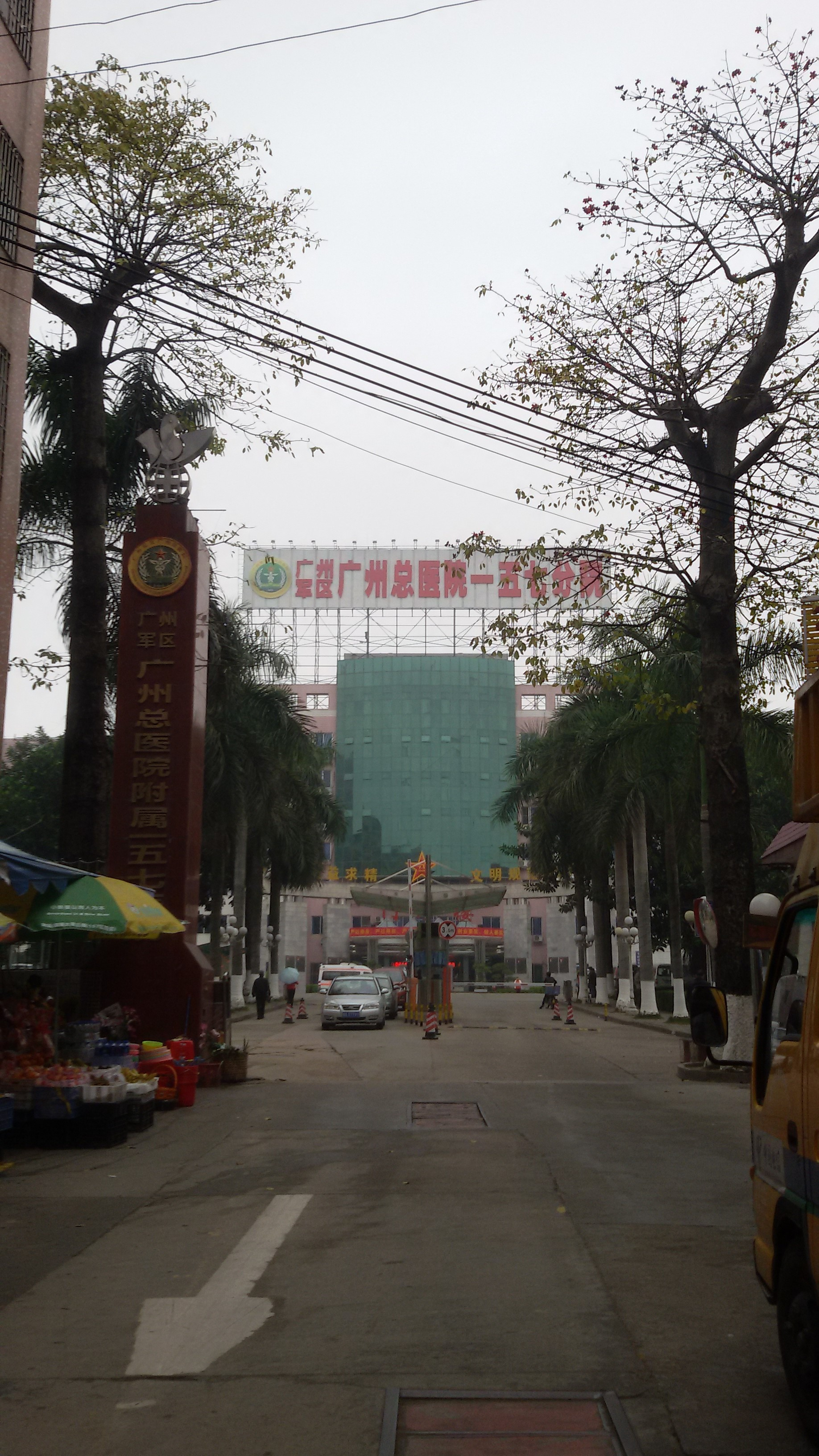 粵語: 广州军区广州总医院附属一五七医院